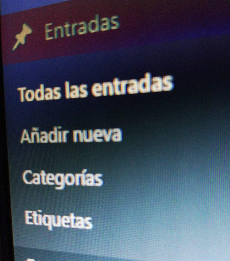 Menú de entradas, categorías y etiquetas de un blog en WordPress